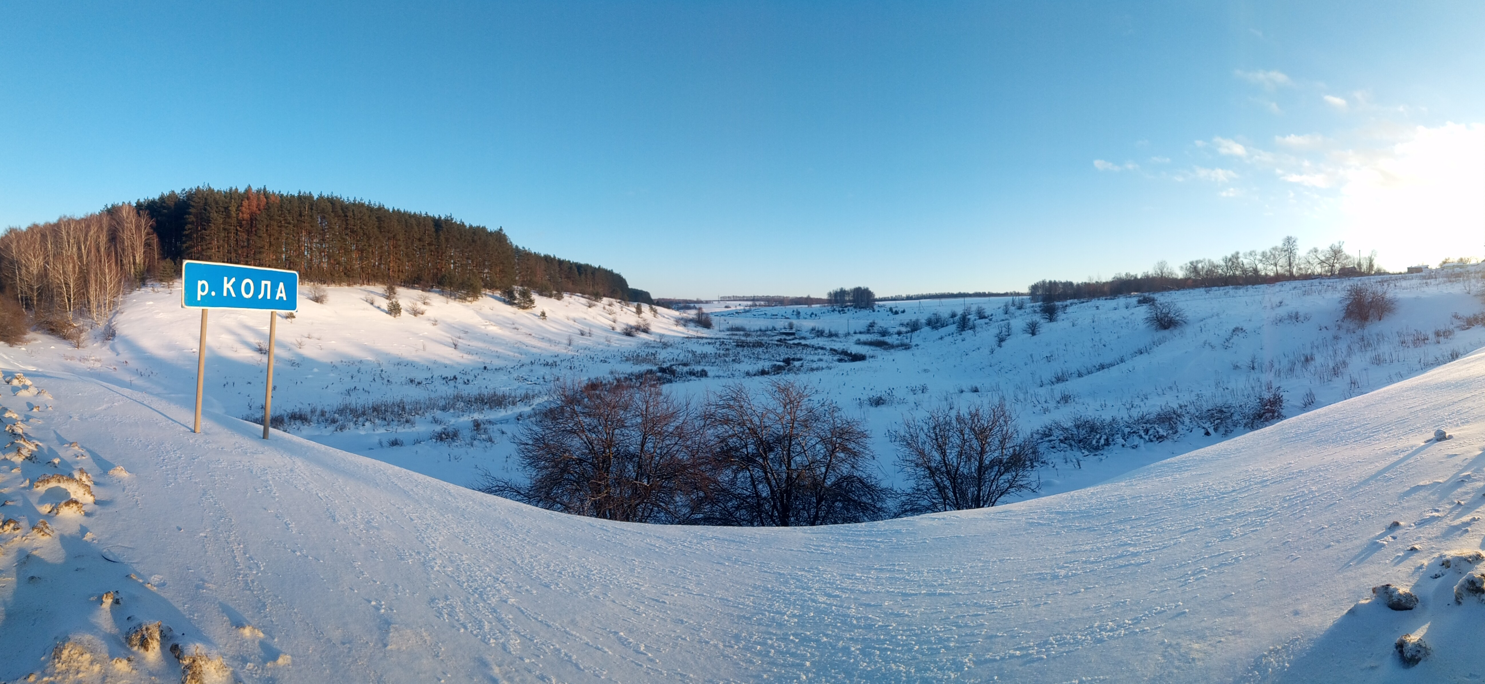 Воинка